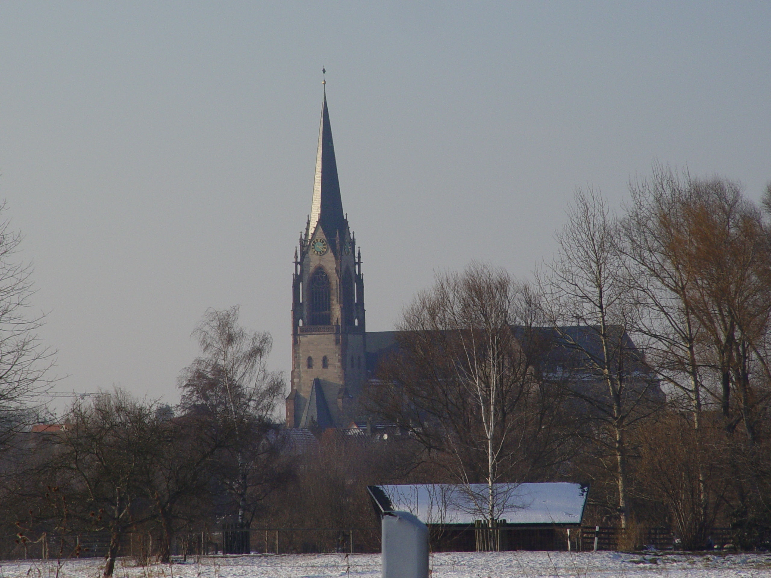 Motiv: Die Muggensturmer Kirche (Maria Königin der Engel) im Winter.